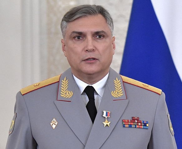 Герой Российской Федерации генерал-майор Александр Матовников